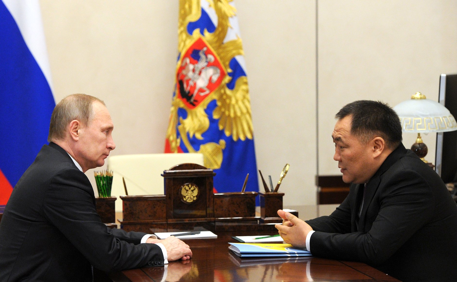 Рабочая встреча Президента России Владимира Путина с главой Республики Тыва Шолбаном Кара-оолом